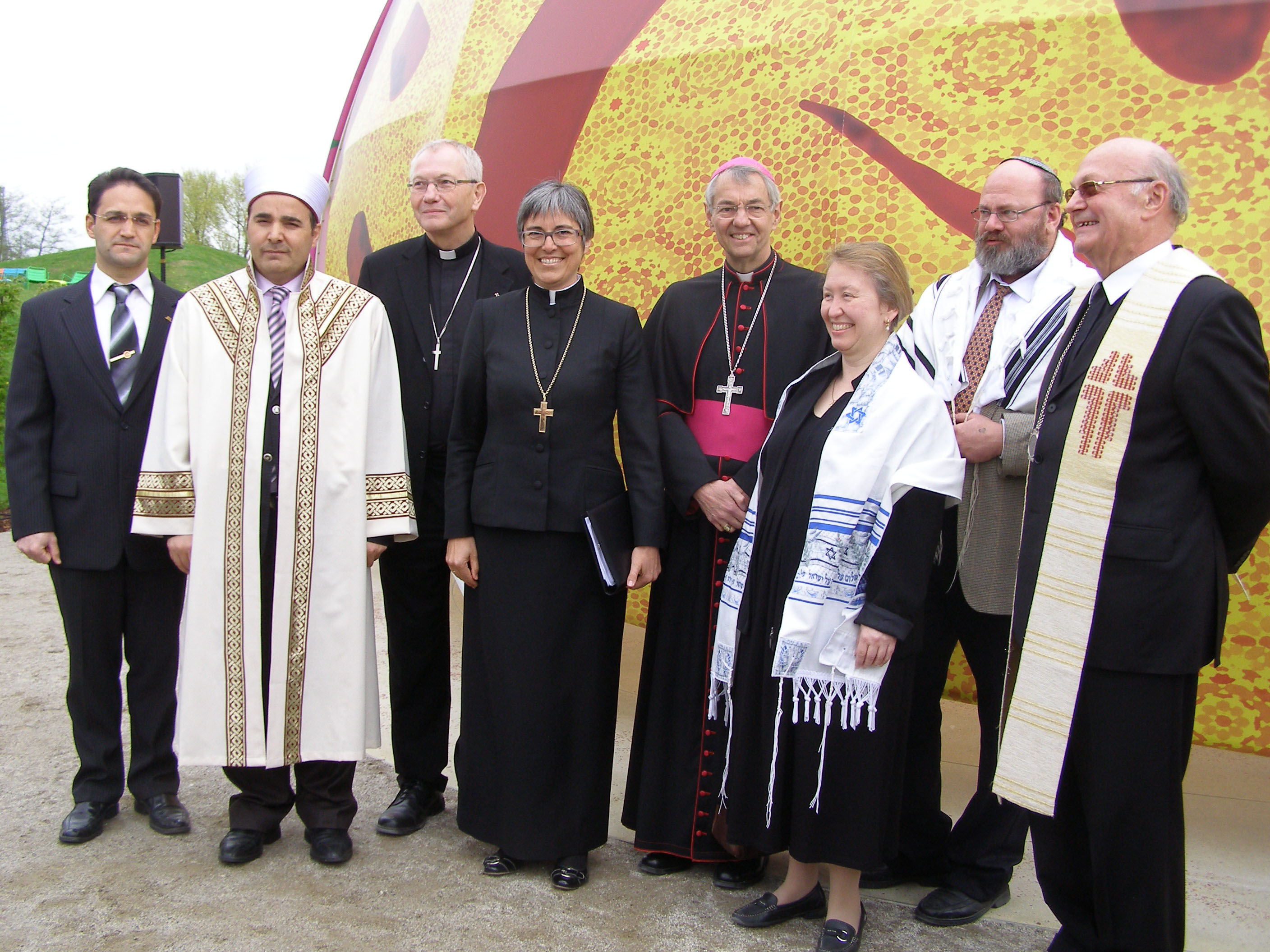 Zelt der Religionen, Eröffnung am 26.04 2012, v.l.n.r.: Religionsattaché Dr. Cafer Acar, Imam Ihsan Uçar, Dekan Otfried Sperl, Regionalbischöfin Dr. Dorothea Greiner, Erzbischof Dr. Ludwig Schick, Rabbinerin Dr. Yael-Antje Deusel, Chasan Arieh Rudolph, Regionaldekan Dr. Gerhard Förch